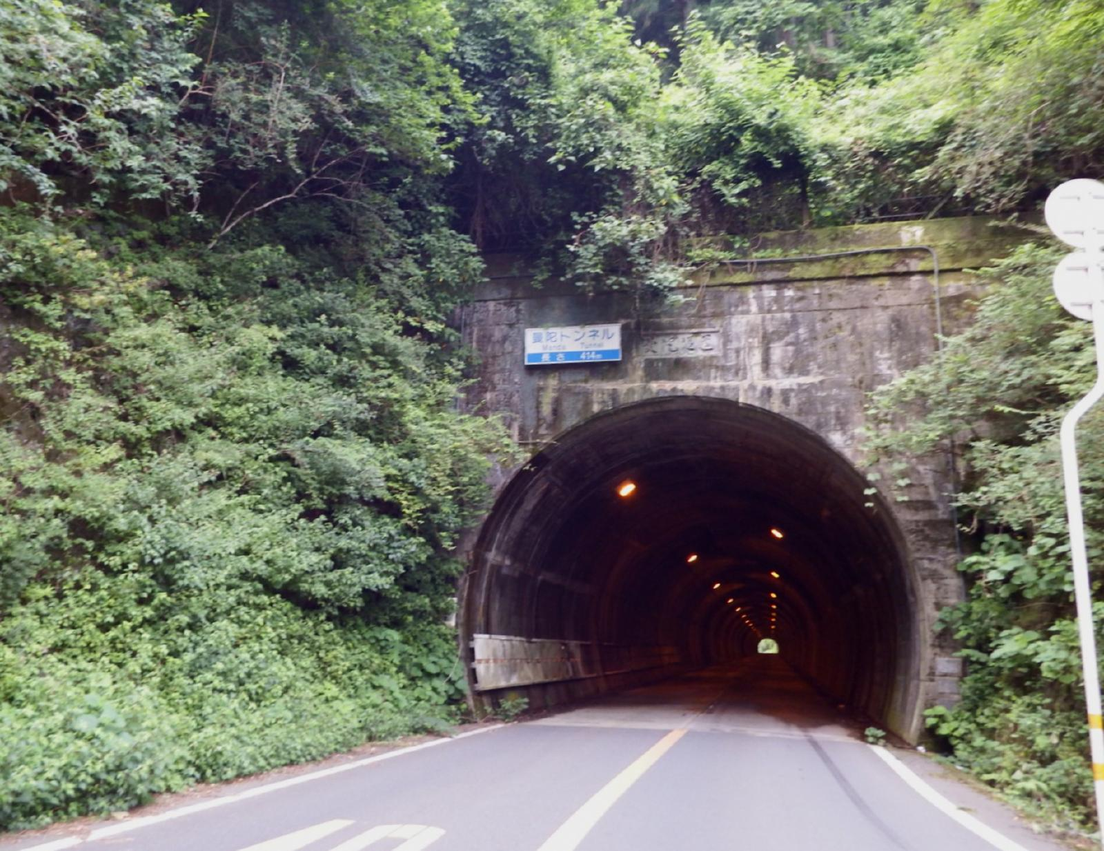 曼陀トンネルの南口